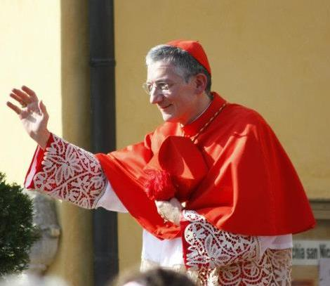 Ingresso del patriarca Francesco Moraglia. Mira (Ve), 24 marzo 2012